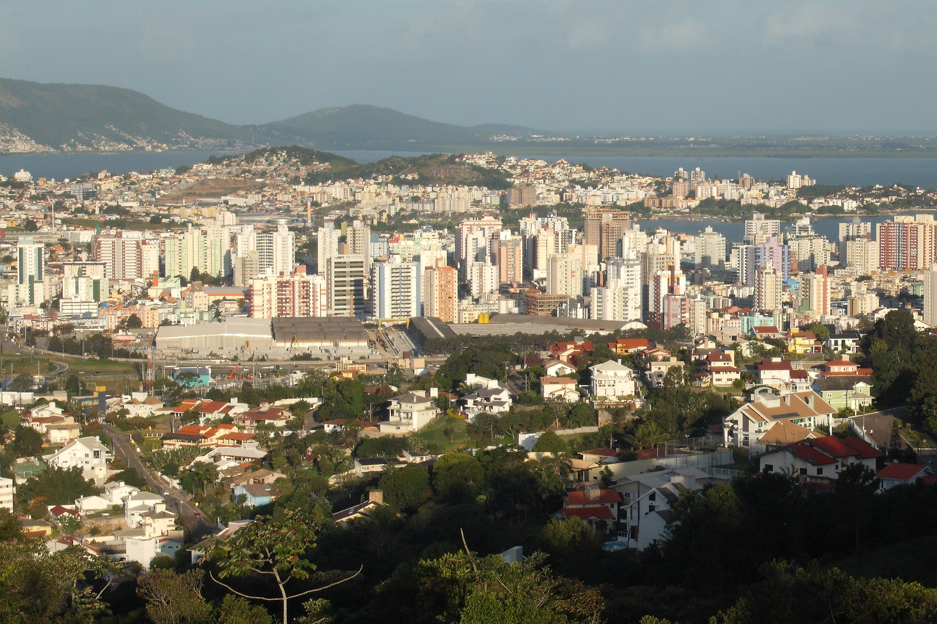 Panorâmica cidade de São José